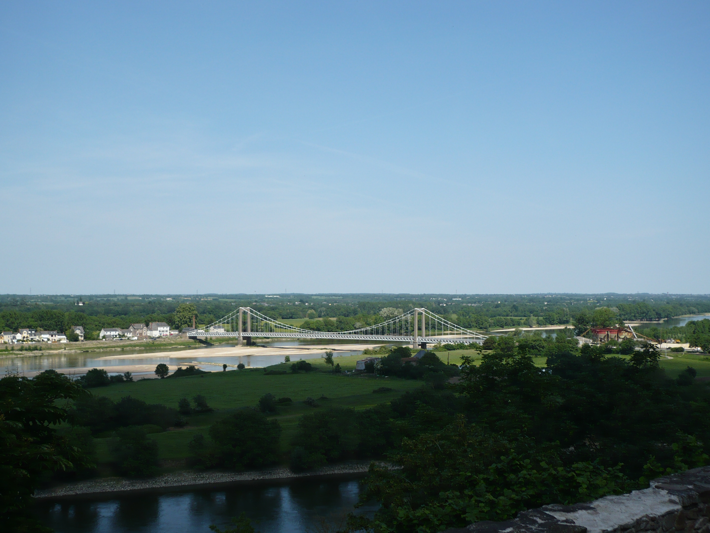 Saint-Florent - Vue sur la Loire et l'Île Batailleuse